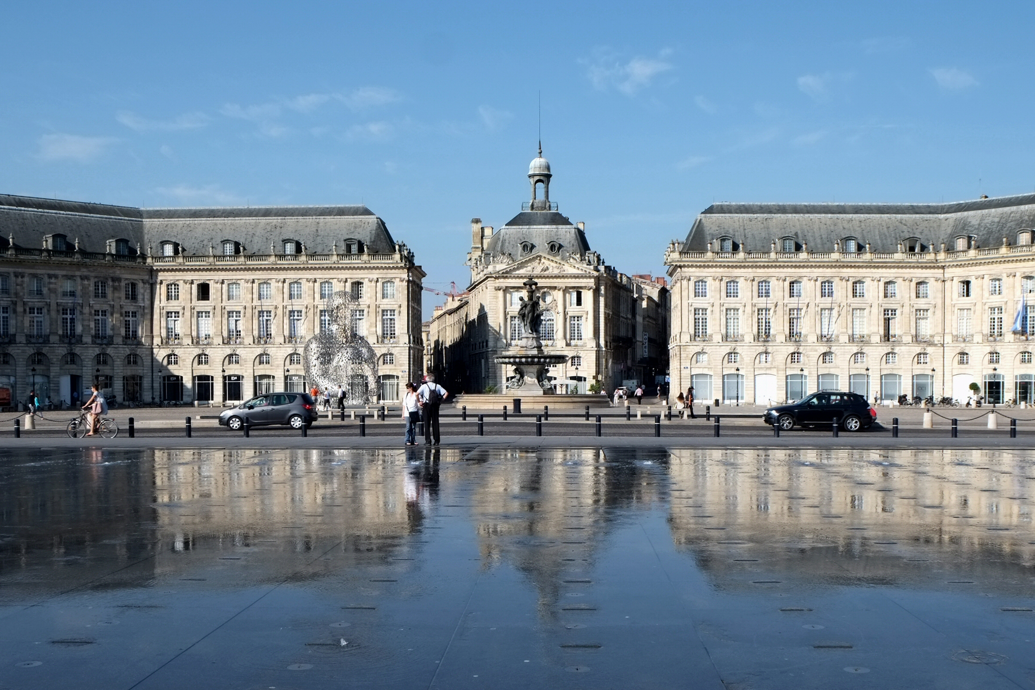 Place de la Bourse Bordeaux Gironde France